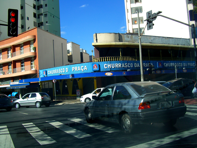 Farol